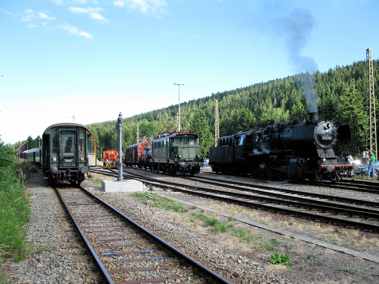 Ausgestellte Züge im Museumsbahnhof Seebrugg der IG 3Seenbahn.